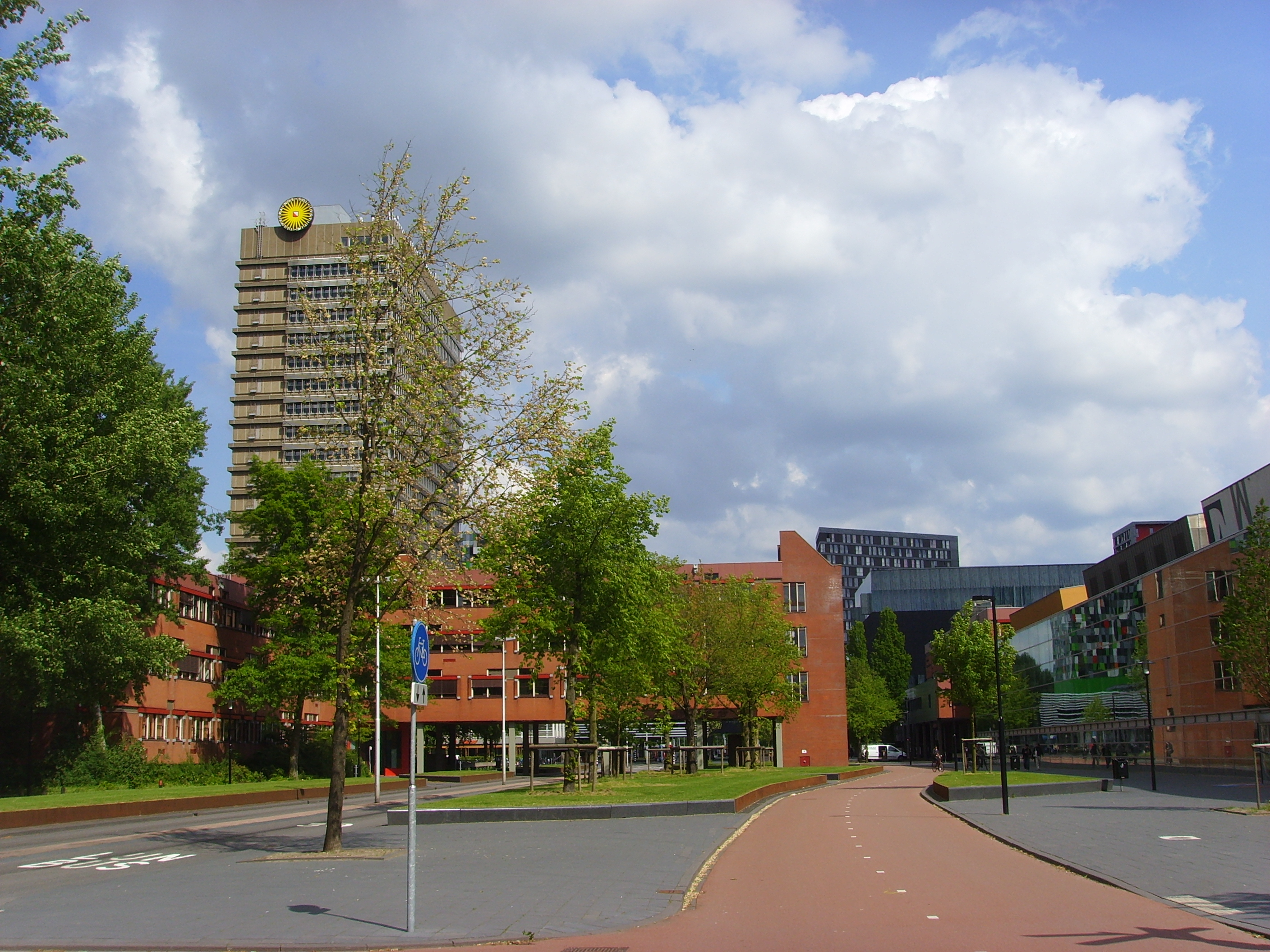 Blik op de Uithof (het universiteitscentrum van Utrecht) vanaf de Padualaan, ter hoogte van de School voor Journalistiek (niet zichtbaar). Linksachter het W.C. van Unnikgebouw.